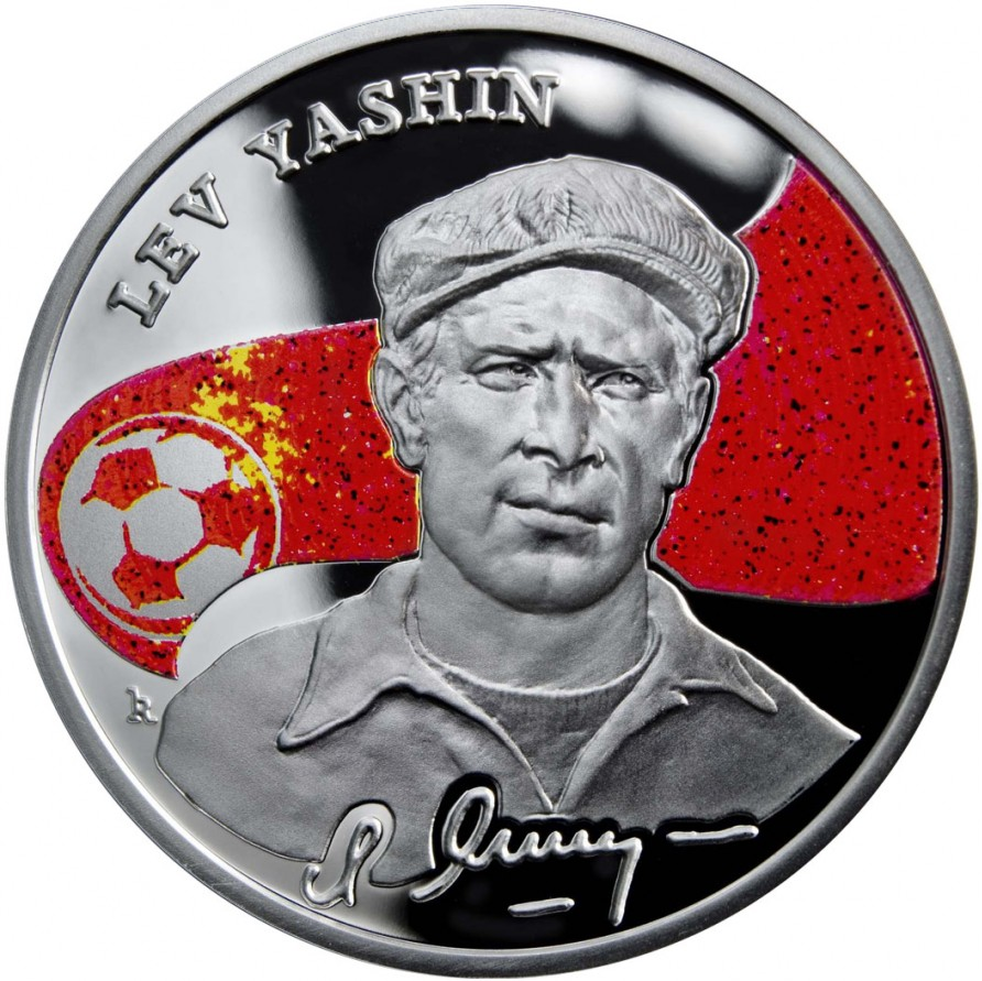 Памятная монета Армении 2008 года серии "Короли футбола" - Яшин - 100 драм - серебро 925